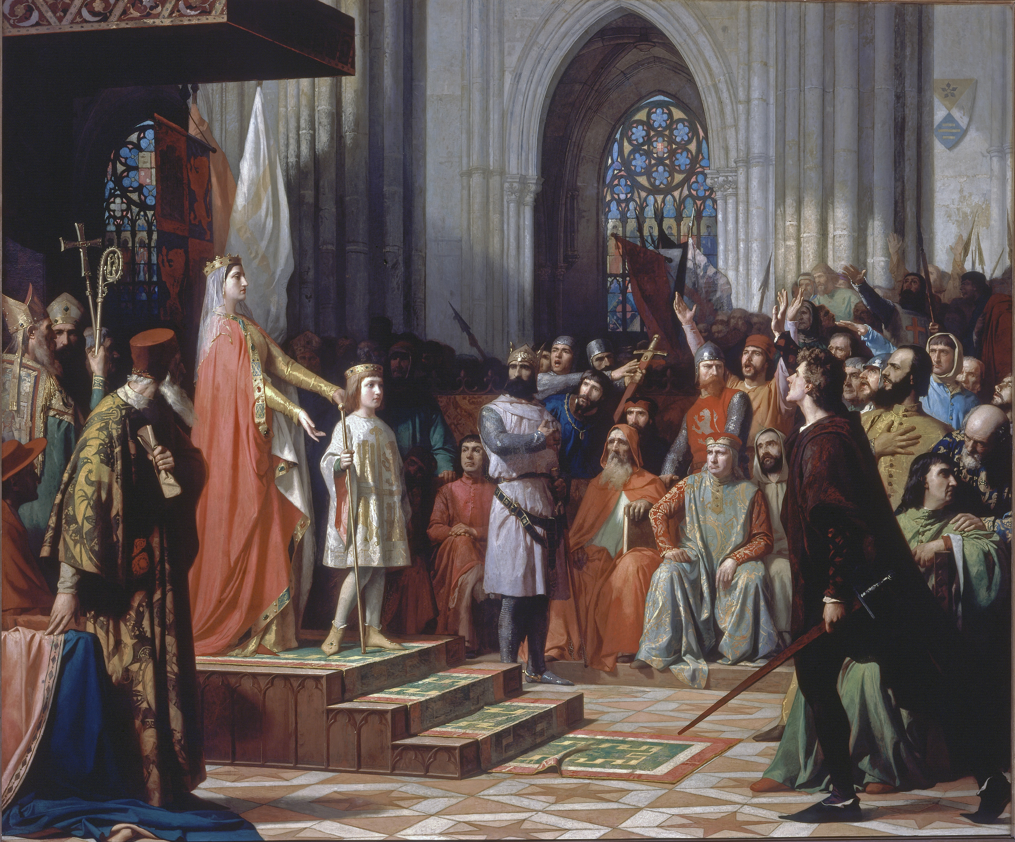 El lienzo representa a la reina María de Molina (c.1264-1321), viuda de Sancho IV de Castilla, presentando a su hijo Fernando IV de Castilla (1285-1312) en las Cortes de Valladolid de 1295, en las que la reina María de Molina consiguió que todos los procuradores presentes en las Cortes rindiesen homenaje al rey Fernando IV, que reconociesen por tutor del rey al infante Enrique de Castilla el Senador, hijo de Fernando III de Castilla, y que la custodia y crianza de Fernando IV le fueran encomendadas a la propia reina María de Molina. A la izquierda del cuadro aparecen representados la reina María de Molina y su hijo, Fernando IV. Ambos personajes están cobijados por un dosel y subidos a un estrado, y detrás de ellos aparecen dos obispos, portando uno de ellos un báculo pastoral. La reina María de Molina está cubierta con un manto rojo, y lleva en la cabeza un velo blanco y una corona. Fernando IV, por su parte, que tenía 10 años de edad en el momento de los hechos, aparece vistiendo una corta túnica blanca, que le cubre hasta las rodillas, y que está adornada con el escudo del reino de Castilla y León. El rey porta un cetro dorado en su mano izquierda, que le llega casi hasta la cabeza, y una pequeña corona. La reina María de Molina tiene los brazos parcialmente extendidos hacia adelante, en un gesto que parece indicar que está velando por el destino de su hijo.